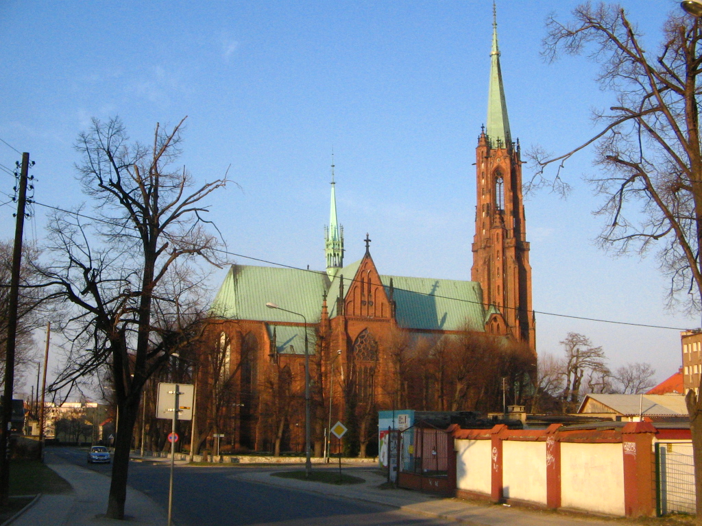 Kościół WNMP w Bielawie